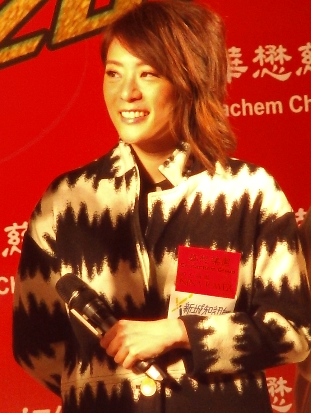 中文（香港）: 王若琪的樣子